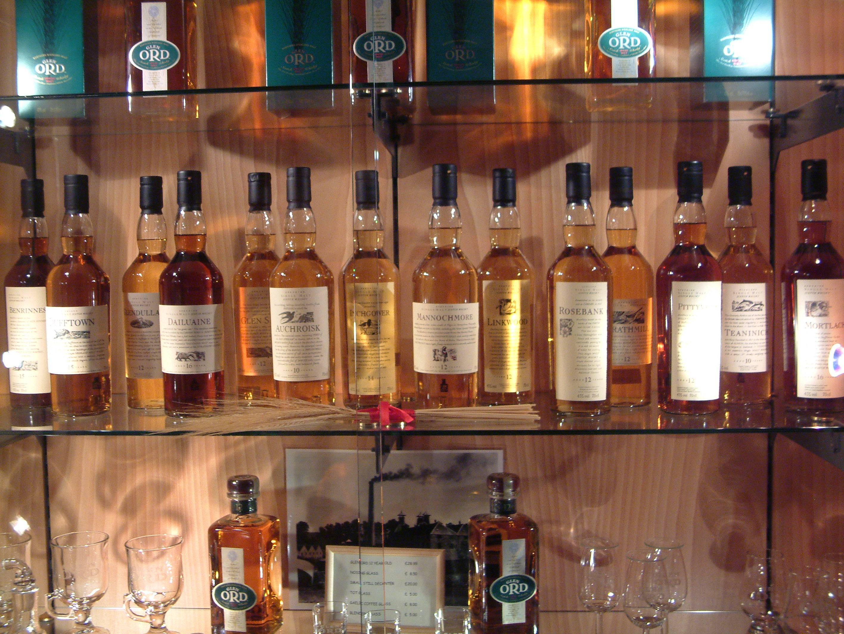 foto StaraBlazkova 2006